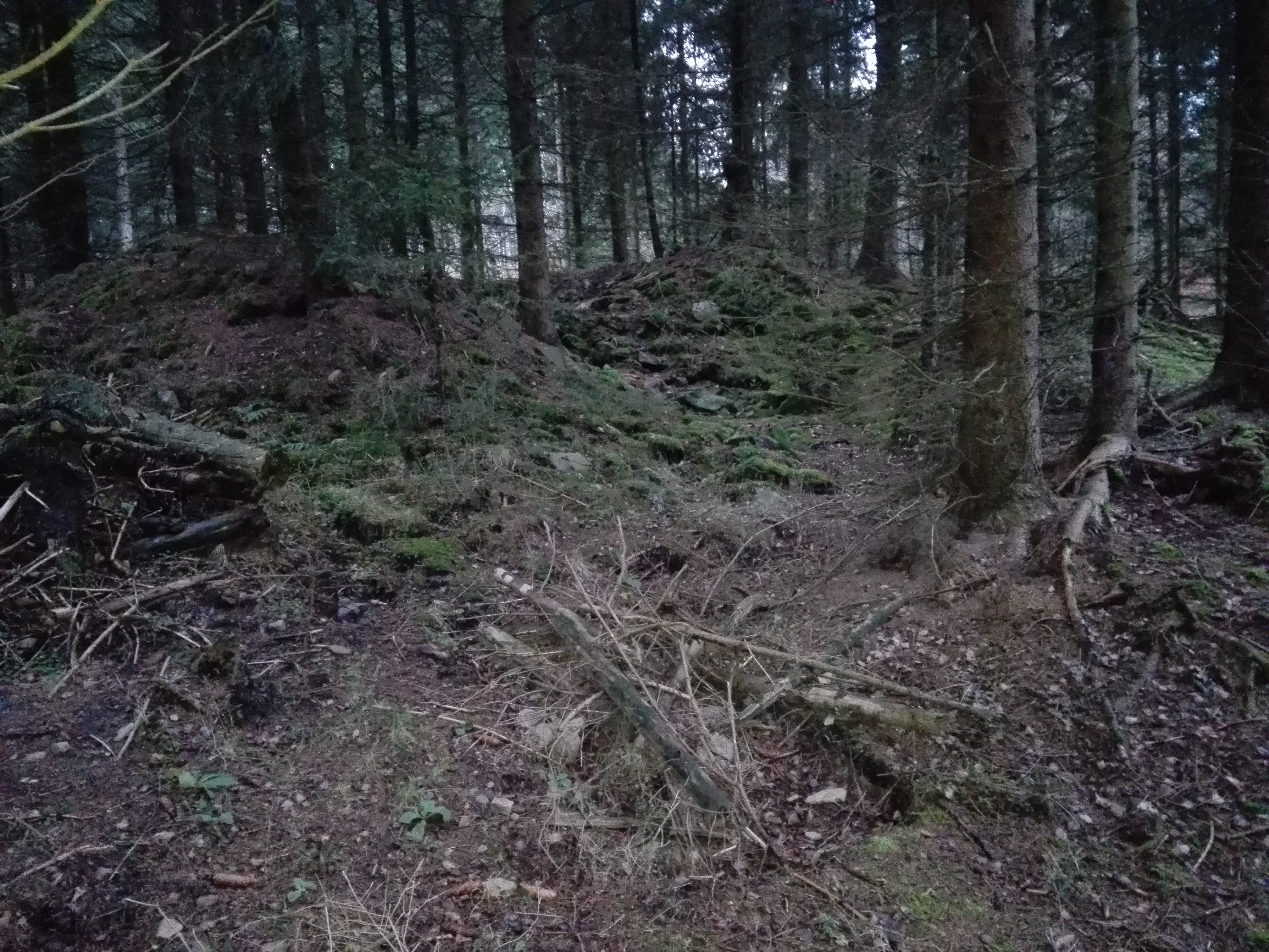 Steinhaufen einer abgedeckten Steinmauerkonstruktion vom Ende des 14.JH Reste der Wüsten Siedlung Hohenwalde, Westlich der Faulen Pfütze im Hochwald.